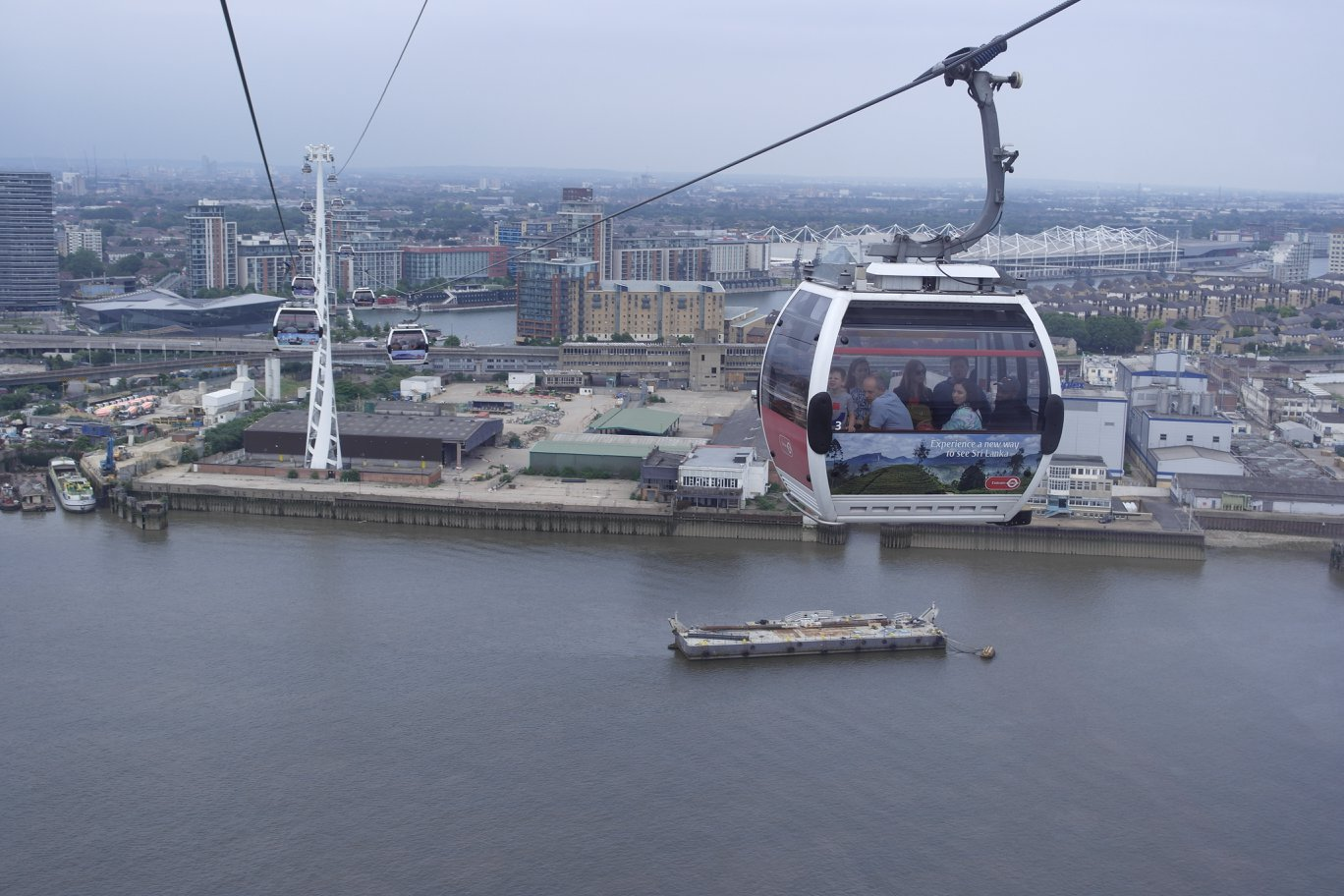 Lanová dráha vede mezi Královským přístavem v Londýně a Greenwich Peninsulou, spojuje tak oba břehy řeky Temže